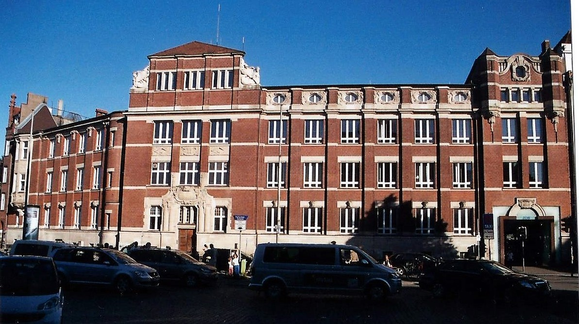 ehem. Verwaltungsgebäude der LBE